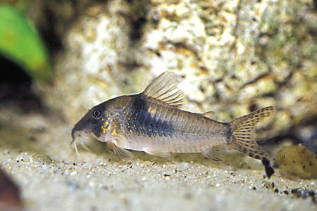 Коридорас Северный (septentrionalis) с бокового ракурса при ином освещении